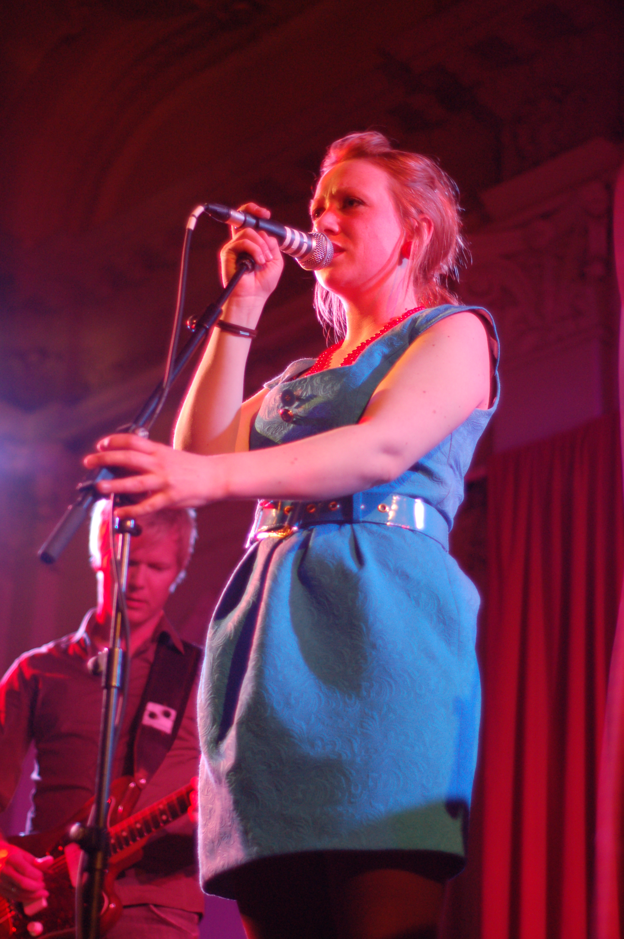 Hanne Hukkelberg performing at Bush Hall.